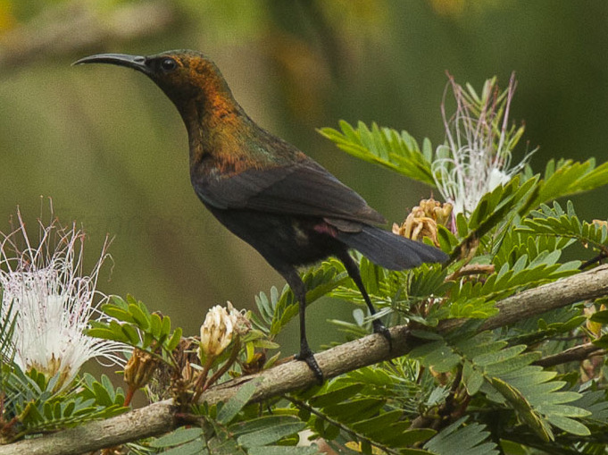 Cinnyris cupreus mâle